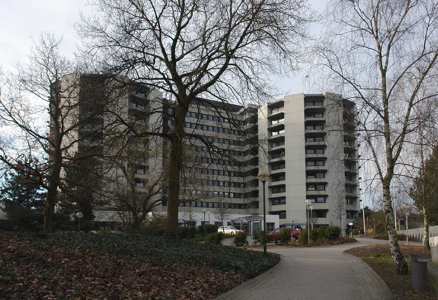 Klinikum Bremen-Ost in Bremen-Osterholz. Haupteingang (Nordseite)